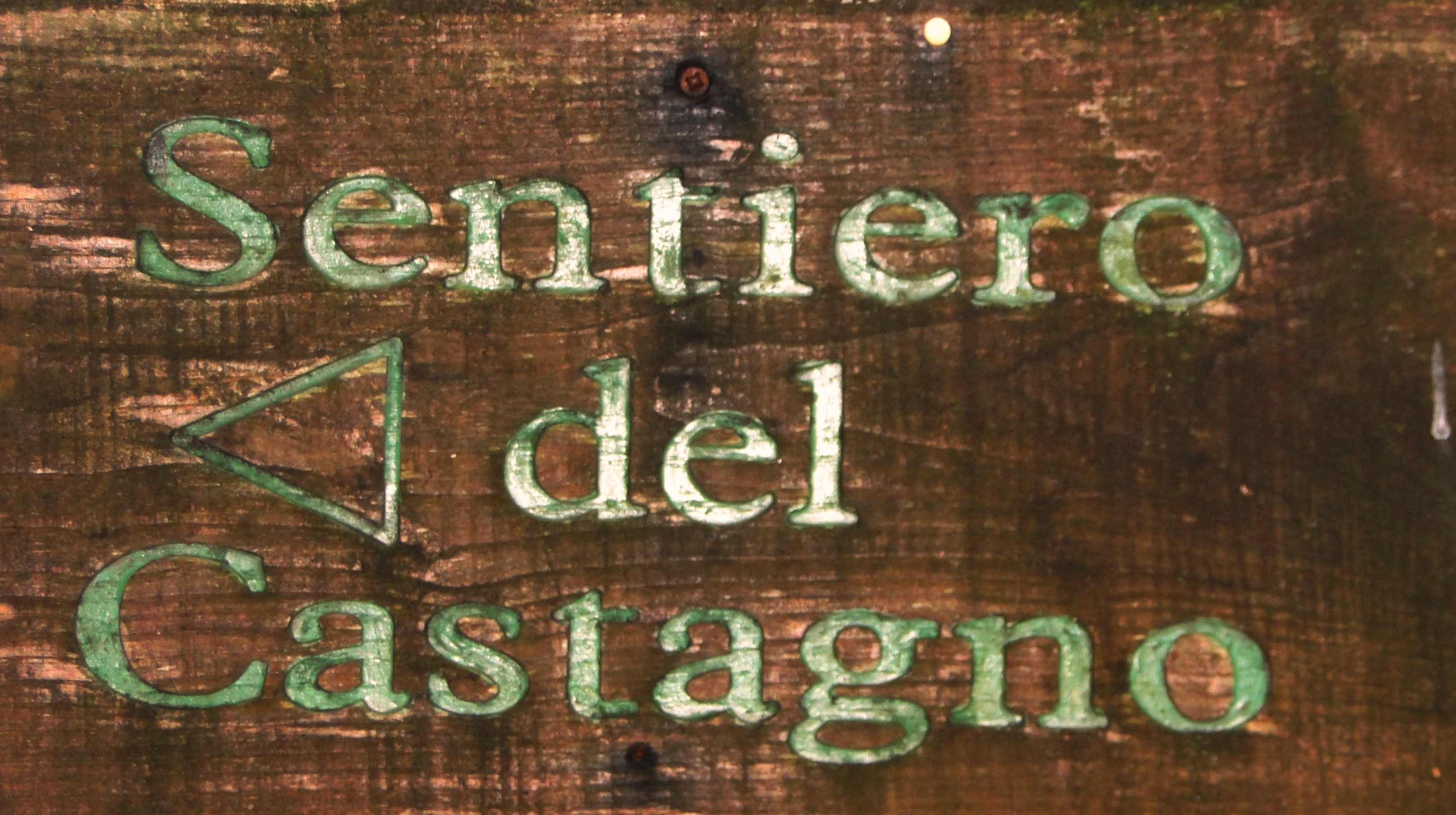 Casale, frazione di Albino (BG). Sentiero del castagno